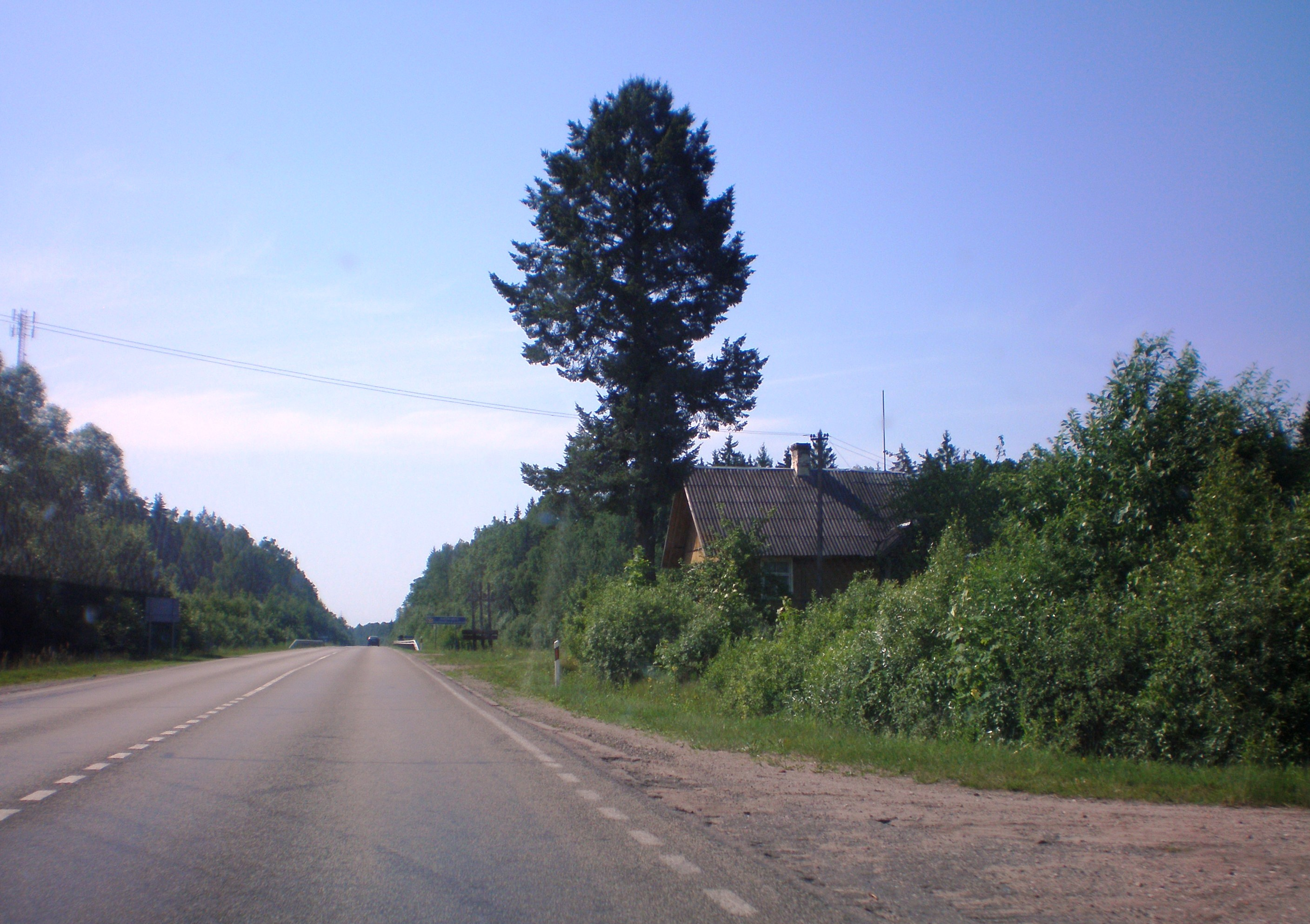 Ilgininkai, Varėnos raj.